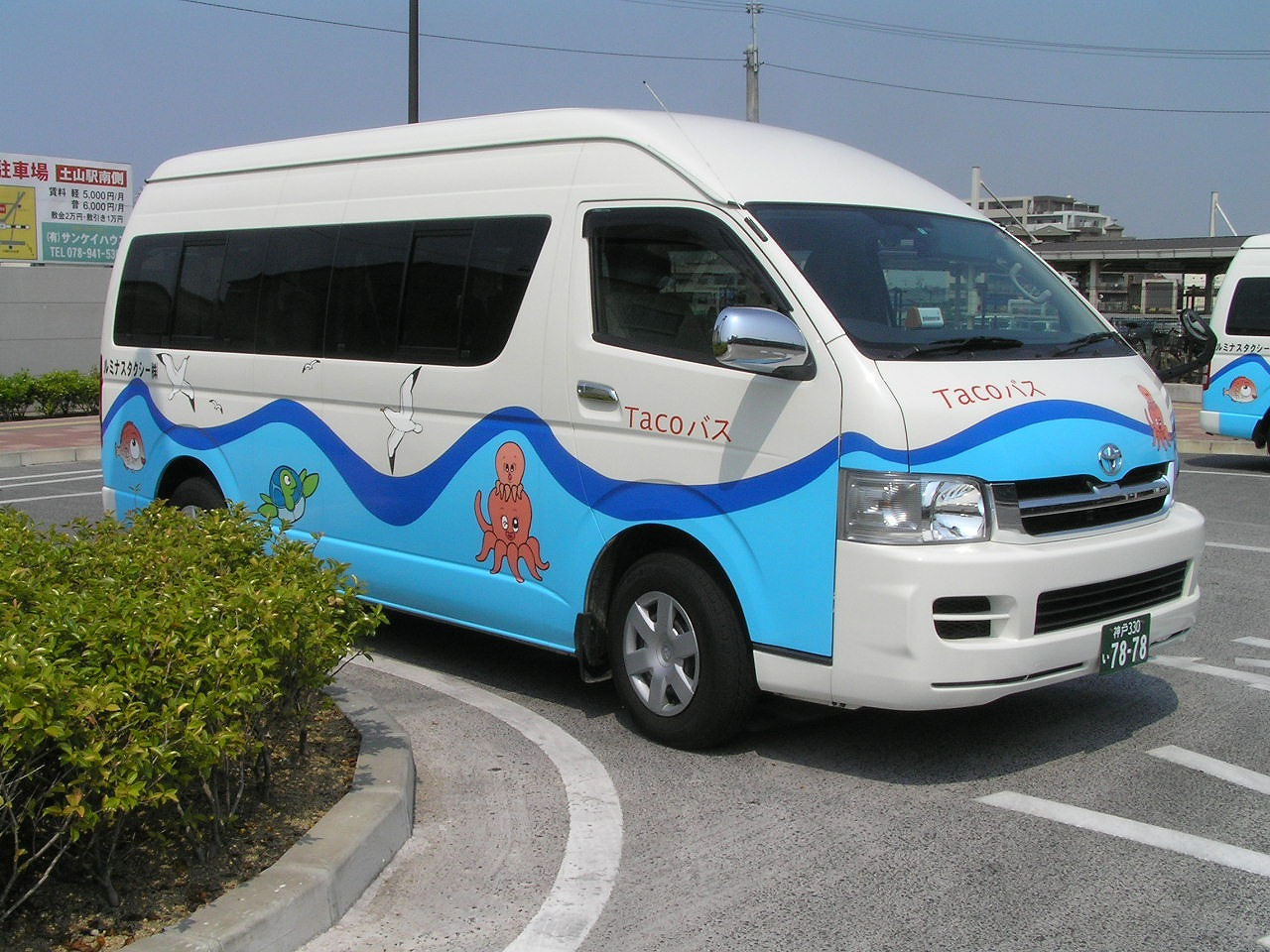 タコバス